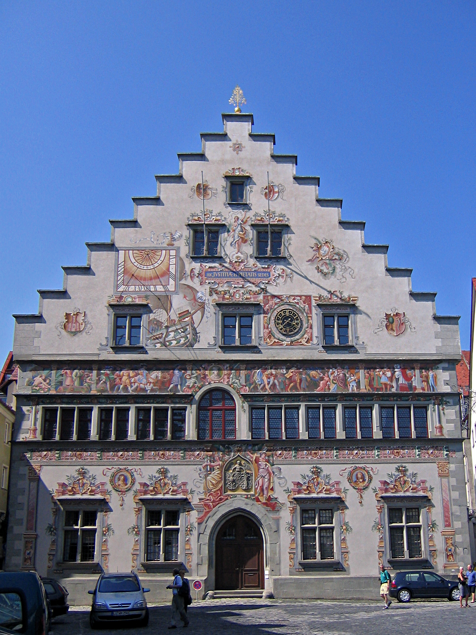 Lindau am Bodensee - Rathaus